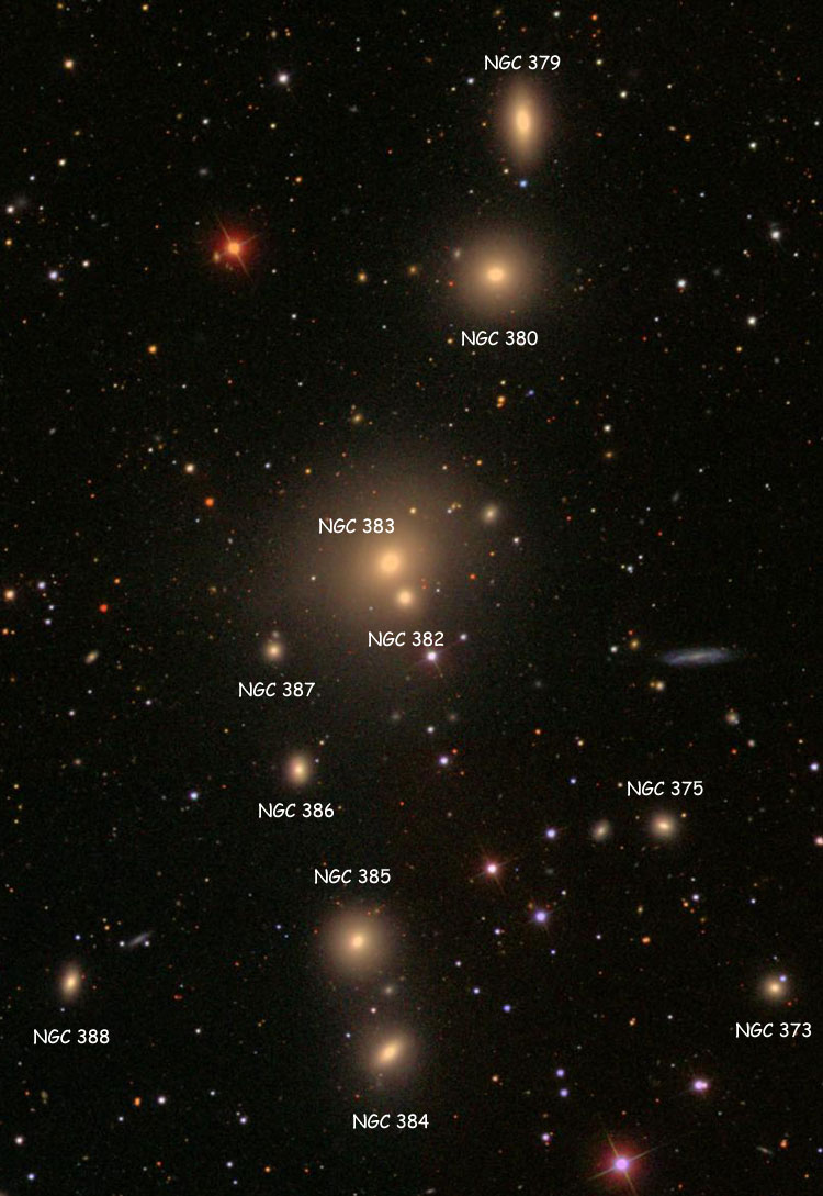 Image créée à l'aide du logiciel Aladin Sky Atlas du Centre de Données astronomiques de Strasbourg et des données de SDSS (Sloan Digital Sky Survey).